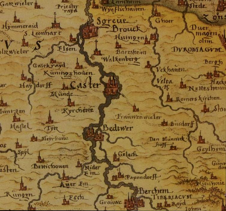 Der Ort Kaster im Atlas des Christian Sgrothen, um 1575